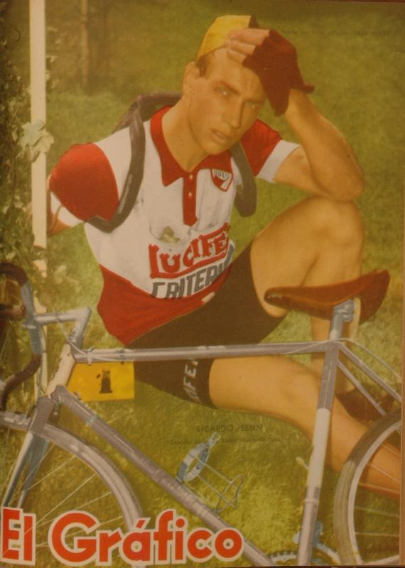 Coberta de la revista El Gráfico:Ricardo Senn-1958